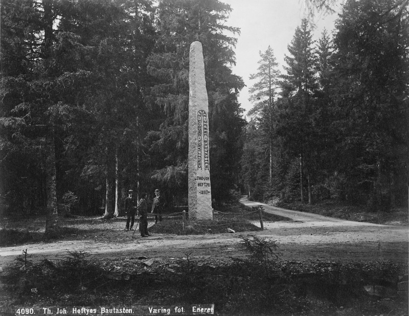 Th. Joh. Heftyes Bautasten på Midtstuen, Oslo, menn3, granskog.